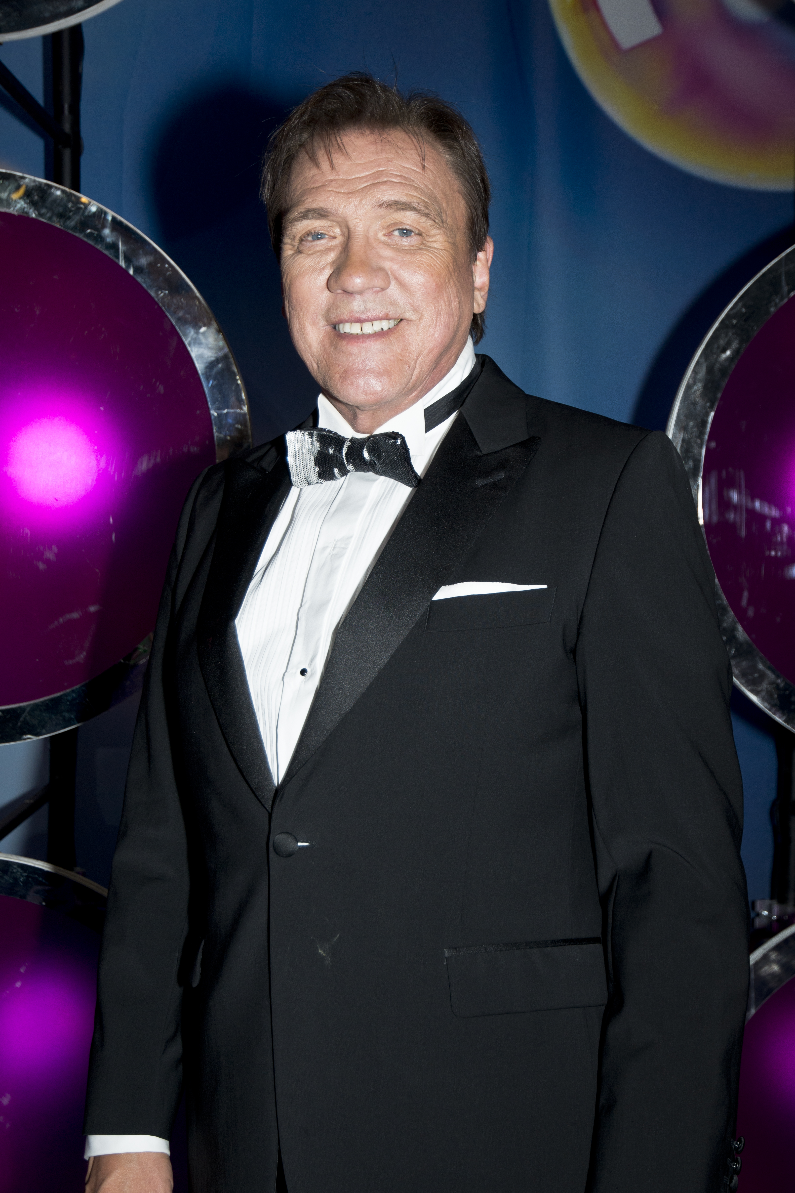 Christer Sjögren på Sommarkrysset 2015